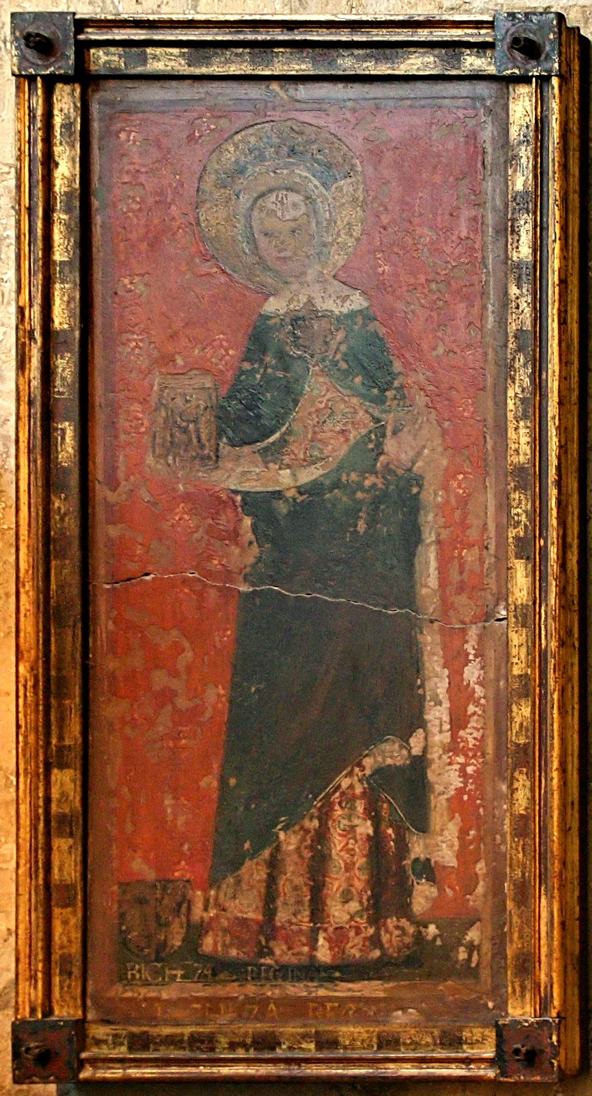 Bildnis der Richeza (Polen) in der Johanneskapelle im Kölner Dom rechts neben der Begräbnisstelle